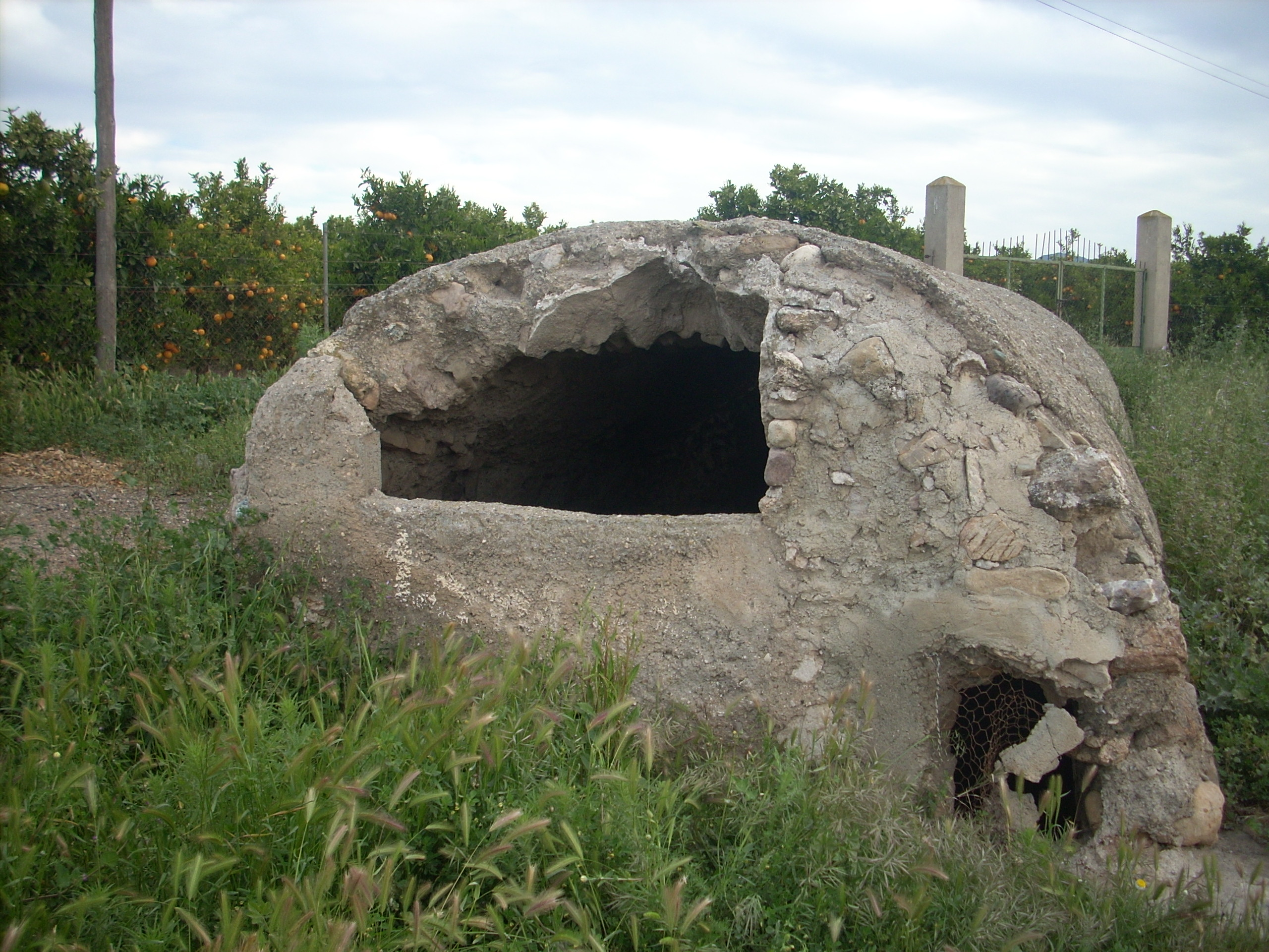 Vista del Aljibe del Esparragal con parte de la techumbre derruida